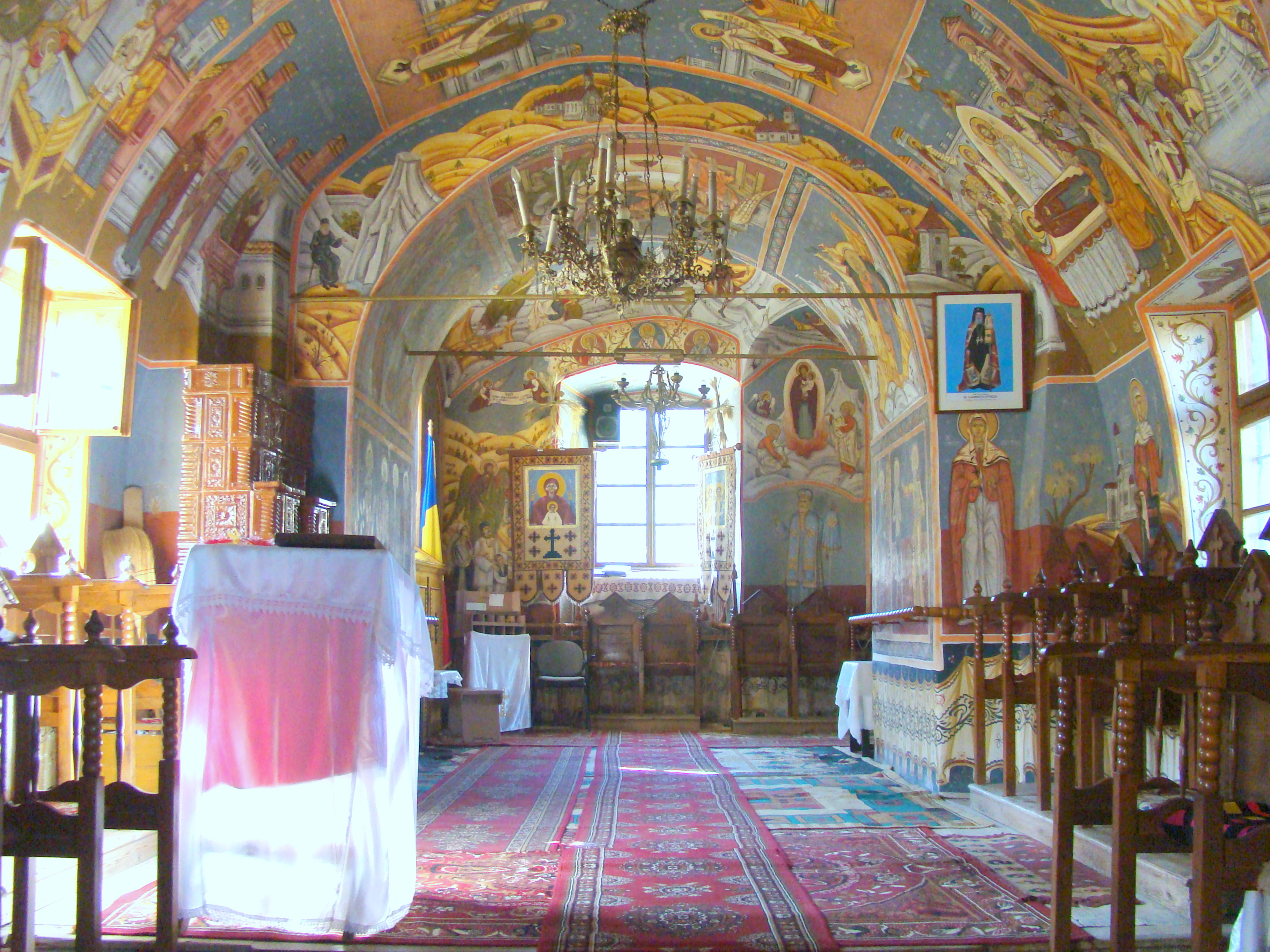 Biserica "Naşterea Sf. Ioan Botezătorul"-Din Grui